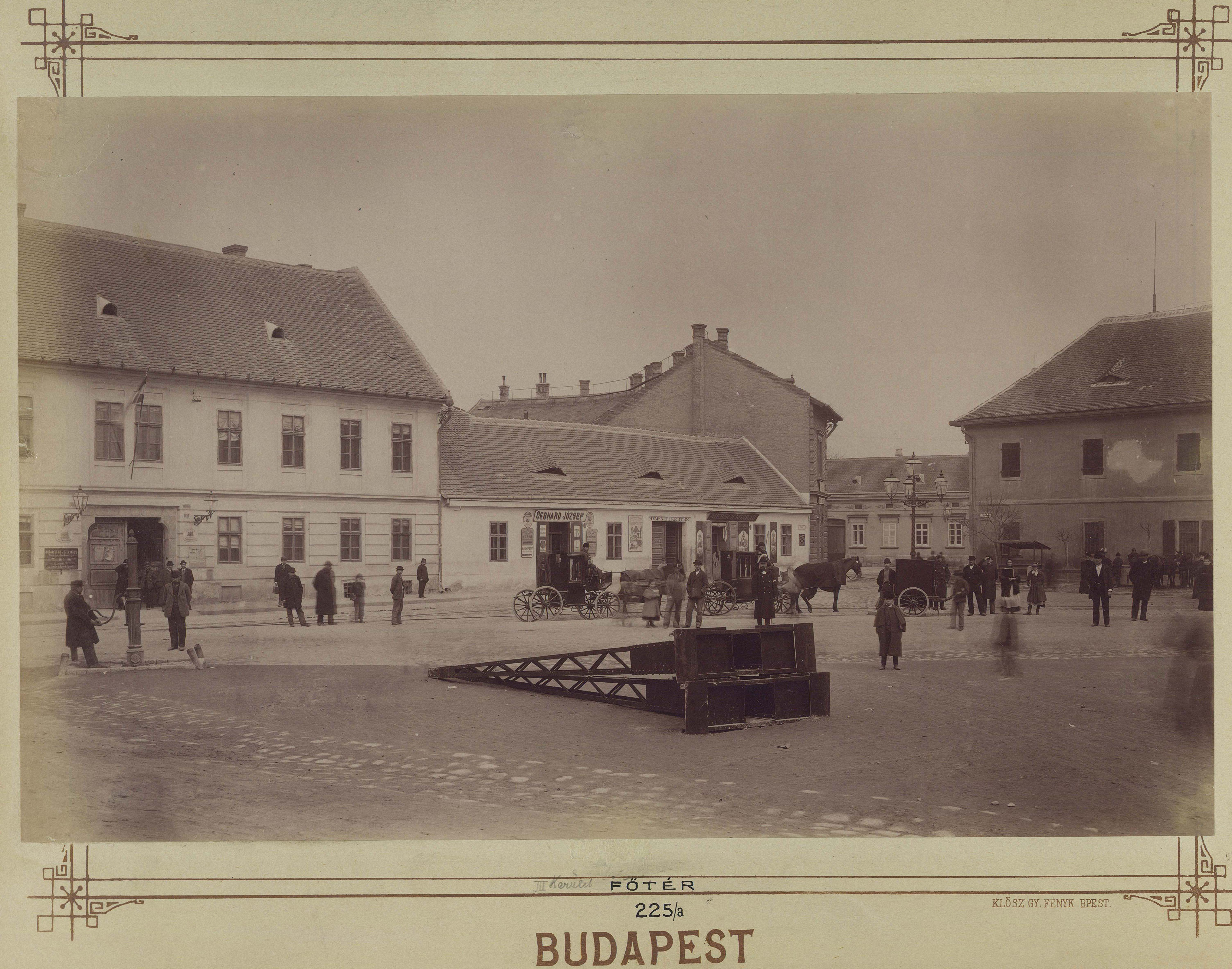 Fő tér. A felvétel 1890 után készült. A kép forrását kérjük így adja meg: Fortepan / Budapest Főváros Levéltára. Levéltári jelzet: HU.BFL.XV.19.d.1.08.027 Location: Hungary, Budapest III., Óbuda Tags: Budapest, cab-horse